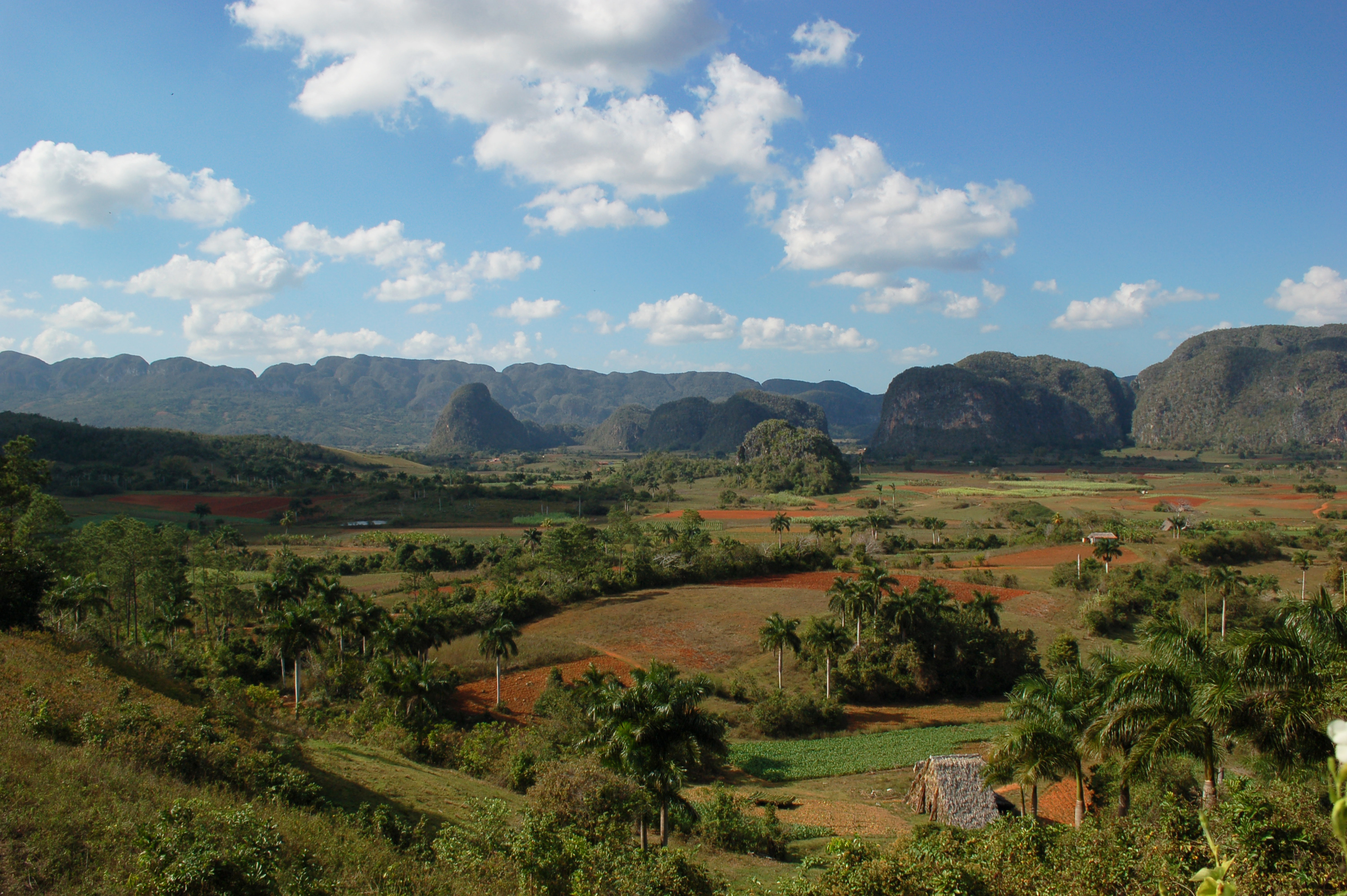 Un fragmento del Valle de Viñales. Centro turistico en la provincia de Pinar del Rio. Cuba